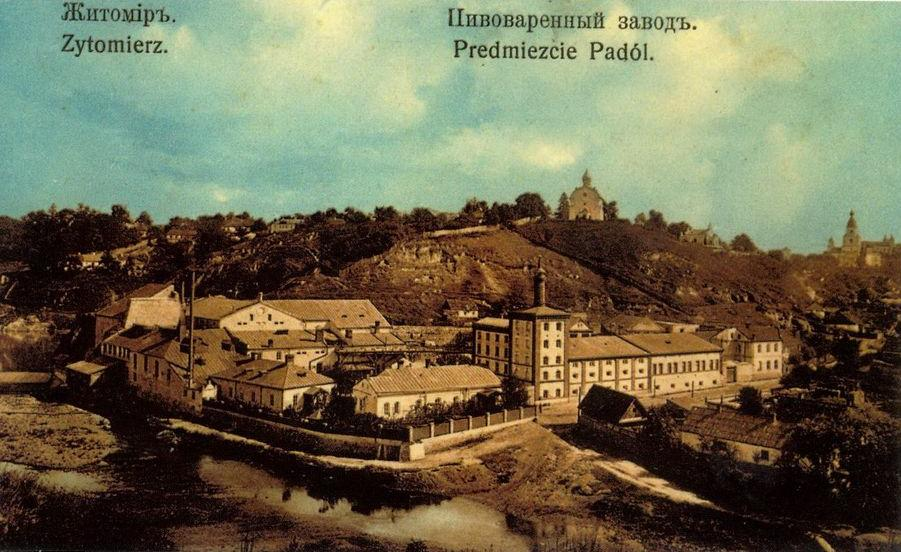 Пивоваренний завод Махачека і Янса у Житомирі, листівка поч. 20 ст.